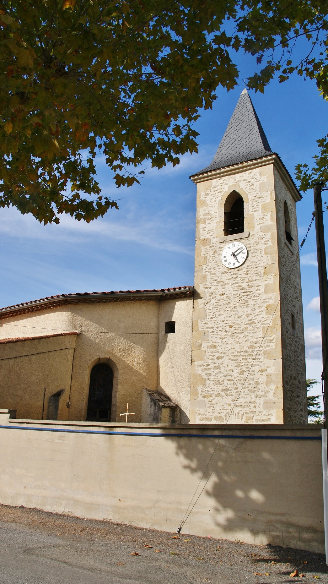 église Saint Theodard